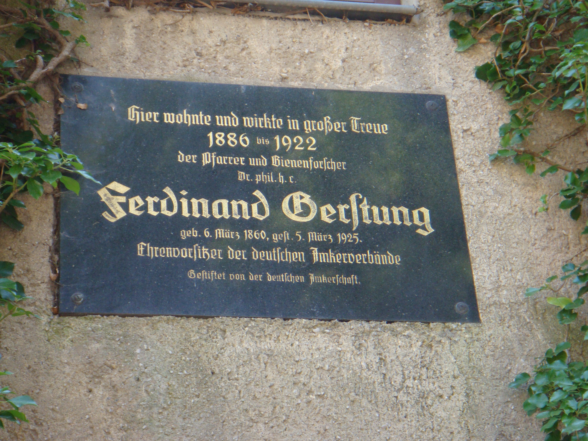 Gedenktafel für Ferdinand Gerstung am Evangelischen Pfarrhaus